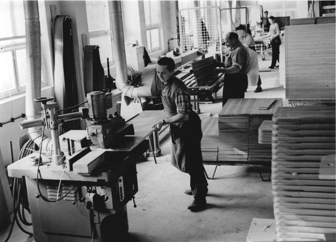 Ohrdruf, Möbelfabrik, Werkhalle Zentralbild Demme 25.10.67 Firma Georg John jun.KG 55 Wohnzimmer vorfristig für die UdSSR lieferten fünf miteinander kooperierende Möbelfabriken der bezirksleitenden Industrie des Bezirkes Erfurt bis zum Jahrestag der Großen Sozialistischen Oktoberrevolution aus. Finalproduzent ist die Firma Georg John jun. KG in Ohrdruf. Hier im Maschinenraum für die Feinbearbeitung der Holzplatten für die Möbel wird entschieden, ob durch gute Qualitätsarbeit die Exporttermine eingehalten bzw. überboten werden können. Brigadier Hans Gießler (vorn) am Furnierschneidegerät sorgt dafür, daß die sowjetischen Kunden zufrieden sein können. Zulieferanten in dieser Kooperationskette sind Volkseigene Möbelwerke in Heringen, Bleicherode, Körner und Erfurt.